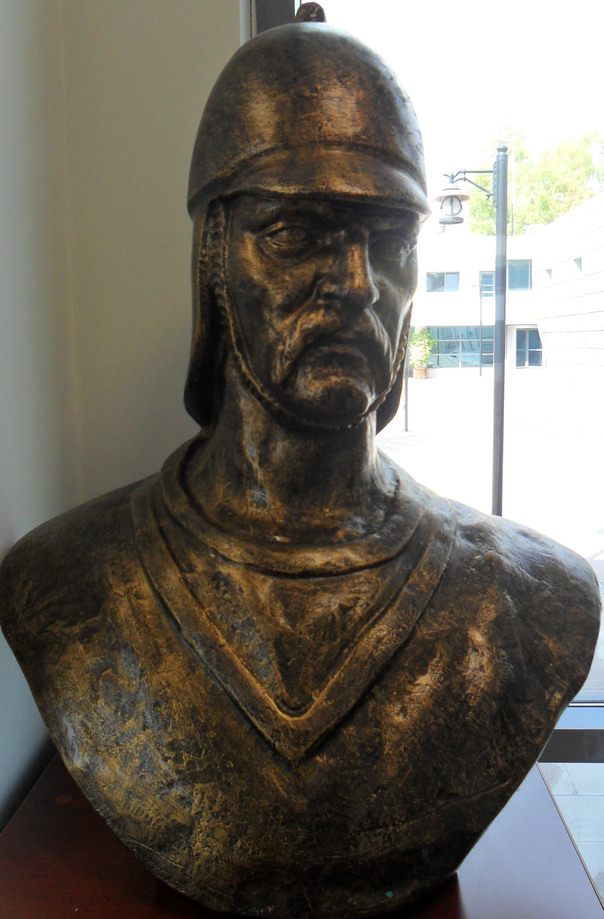 Mersin Deniz Müzesinde bulunan Umur Bey büstü.